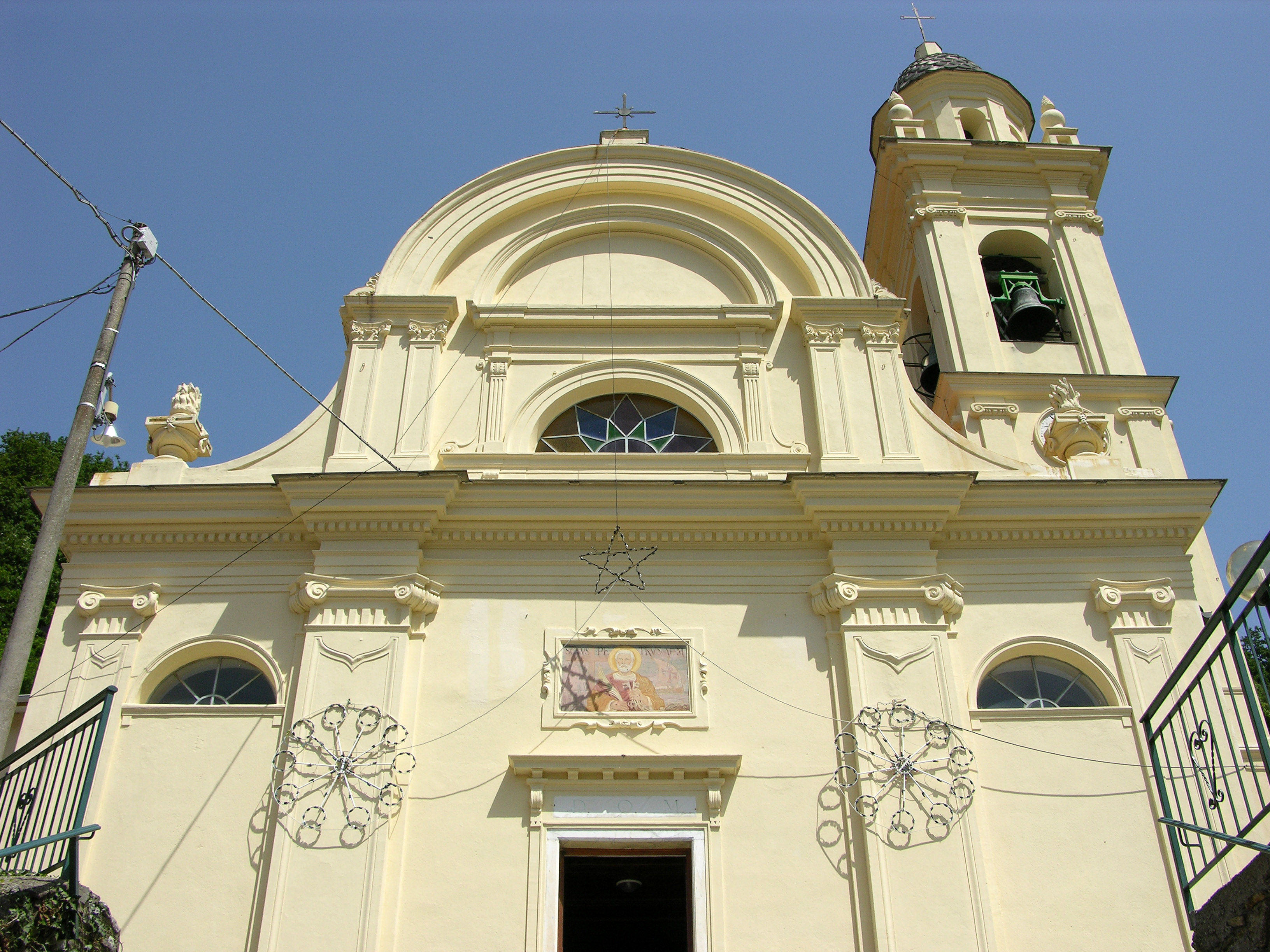 Chiesa di S. Pietro Apostolo nel comune di Davagna (GE)